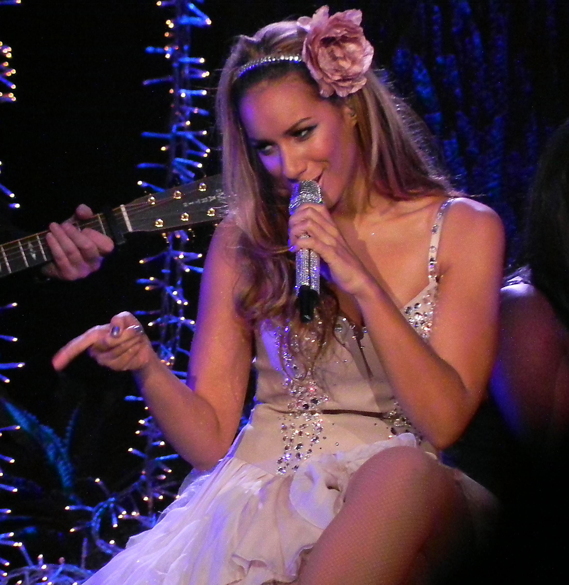 Leona Lewis durante a sua turnê "The Labyrinth" (em português: O Labirinto)